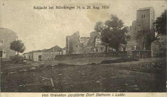 devasted village of Dalhain (dt Dalheim), France, Département de la Moselle, Lothringen